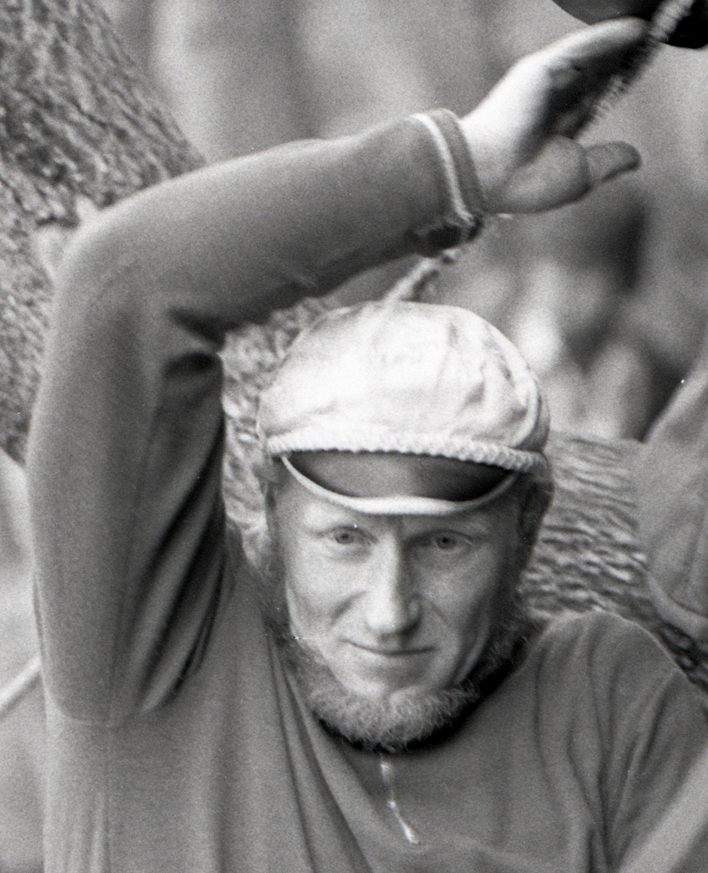 Aaro Aedviir, alpinist